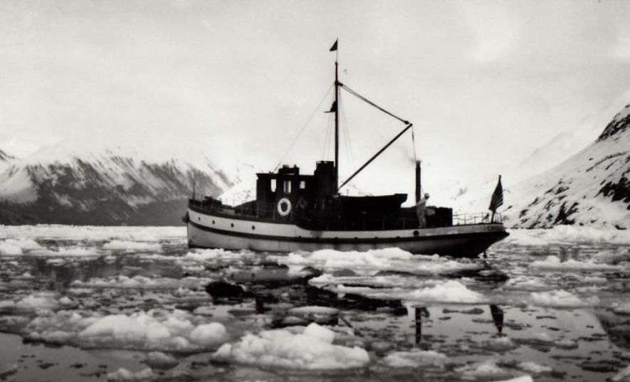 Ranger Boat Chugach at Nunatak Fjord